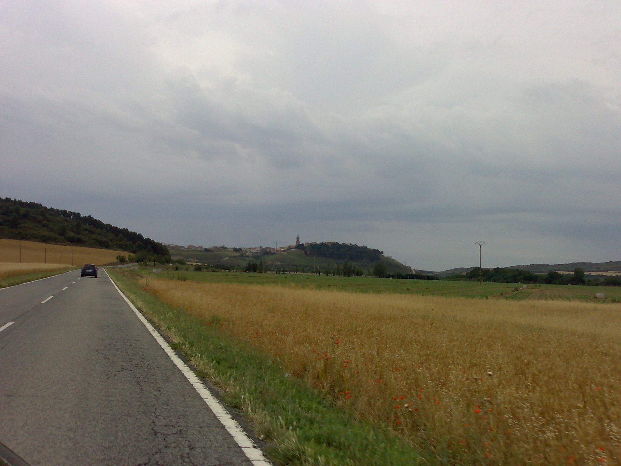 Mendigorria, errepidetik ikusia.